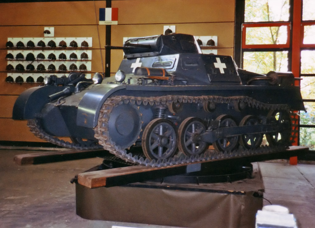 Dieses Bild zeigt einen Panzerkampfwagen I Ausf. A auf Drehbühne im Panzermuseum Munster.